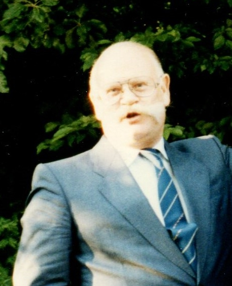 Porträt Joachim Christian Becker, MdHB